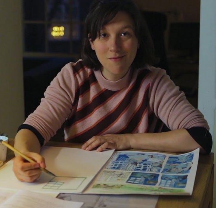 BOEKENTIPS IN 1 MINUUT – "Ik vond het altijd een heel mysterieus verhaal en het is blijven hangen, dus wilde ik mijn eigen vertelling ervan maken." – Lies Van Gasse, 35, dichter, beeldend kunstenaar, docent, Antwerpen.